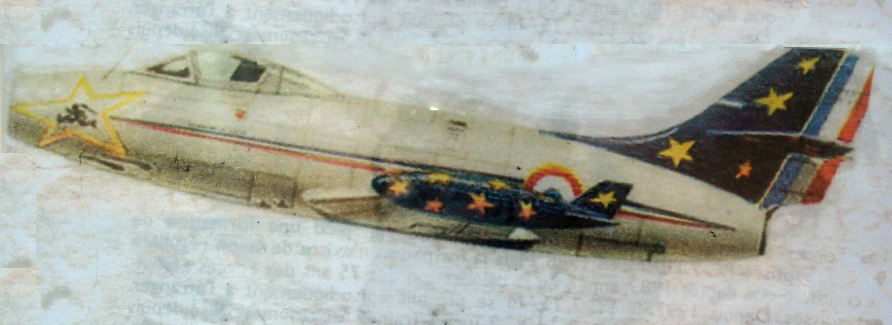 Décoration de la patrouille de france alors qu'elle était sur la base aérienne 136 Bremgarten et sur Ouragan .